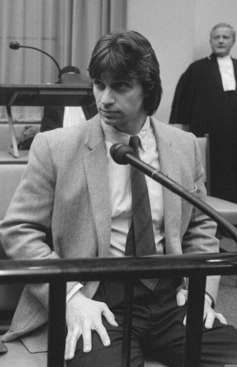 Proces tegen Heinekenontvoerders Cor van Hout en Willem Holleeder (rechts) in het Paleis van Jusitie in Amsterdam.